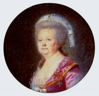 Анна Васильевна Остерман, ур. Толстая (1732—1809), жена Ф. А. Остермана.